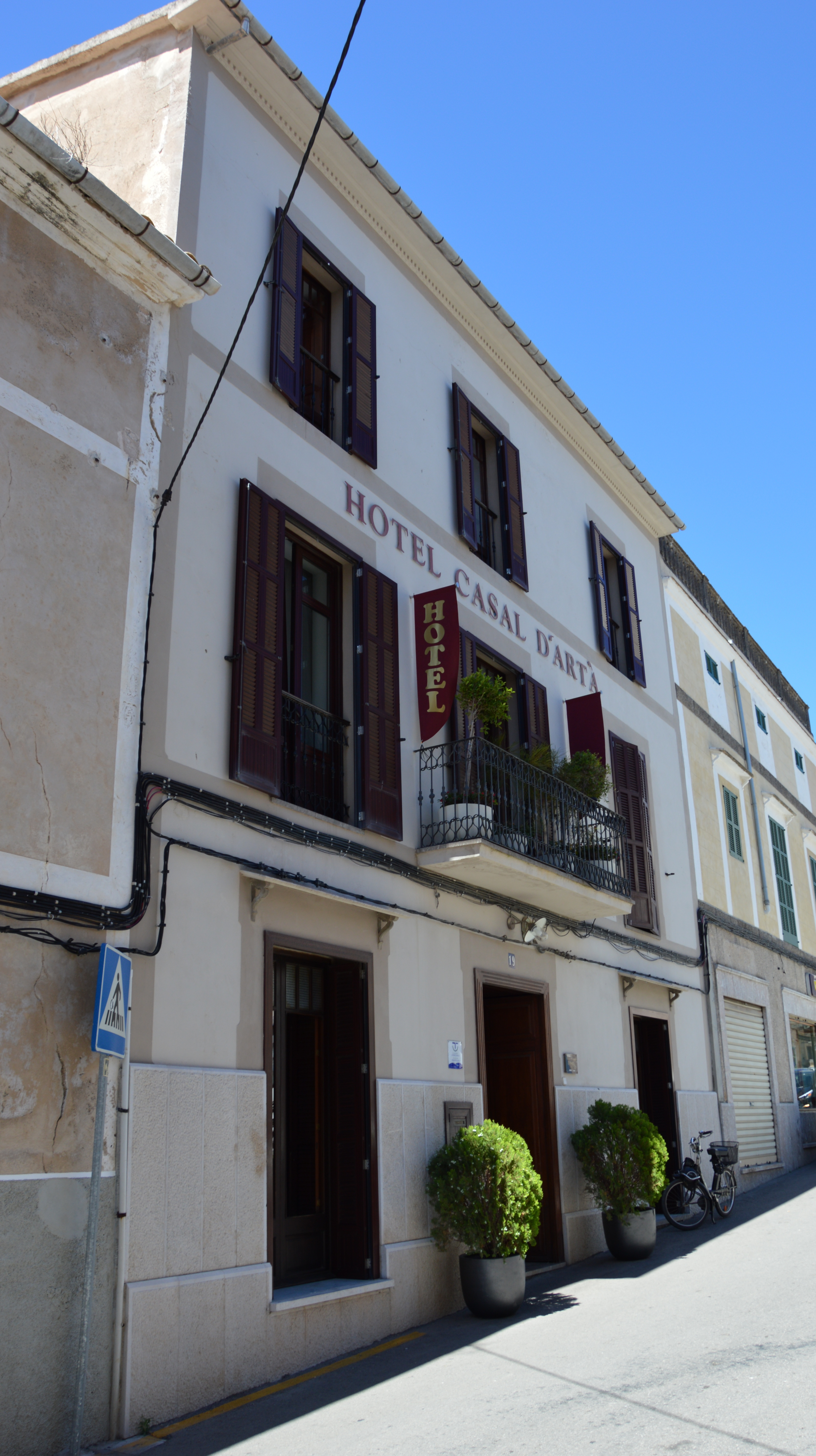 Hotel Casal d Arta